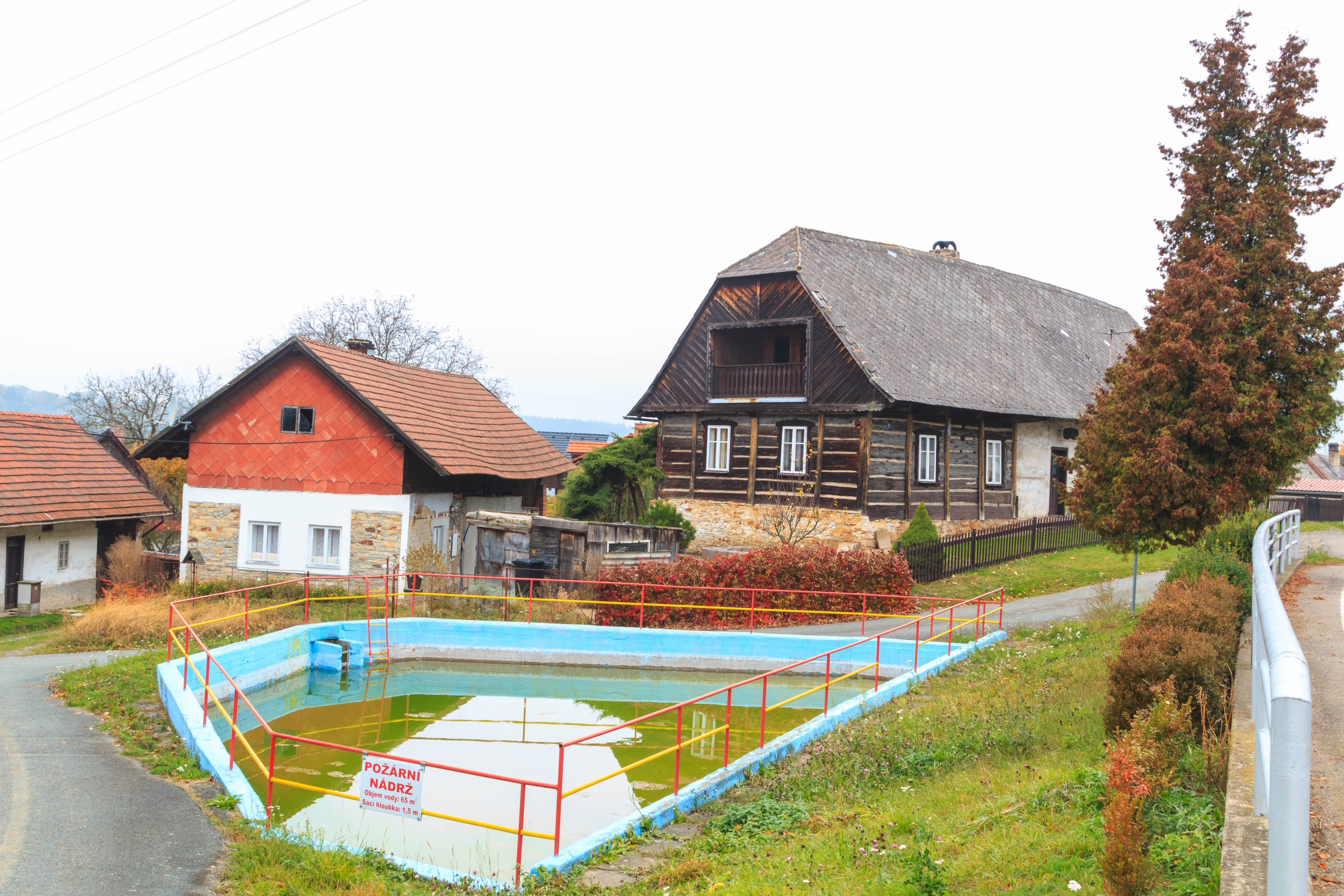 Libel - čp. 22